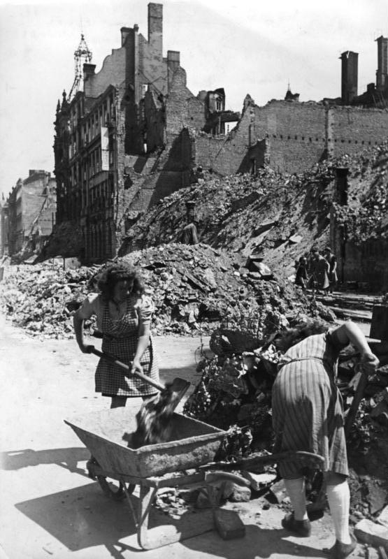 Berlin, Jägerstraße, Trümmerfrauen Zentralbild Berlin im Juli 1946. Berliner Frauen bei Aufräumungsarbeiten in der Jägerstrasse.